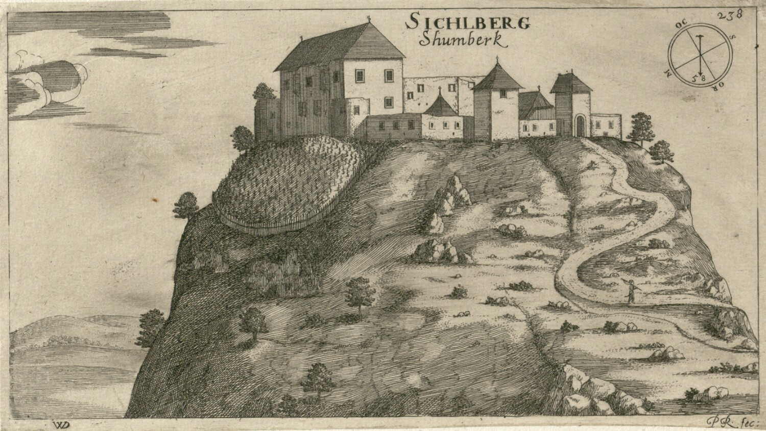 Grad Žumberk